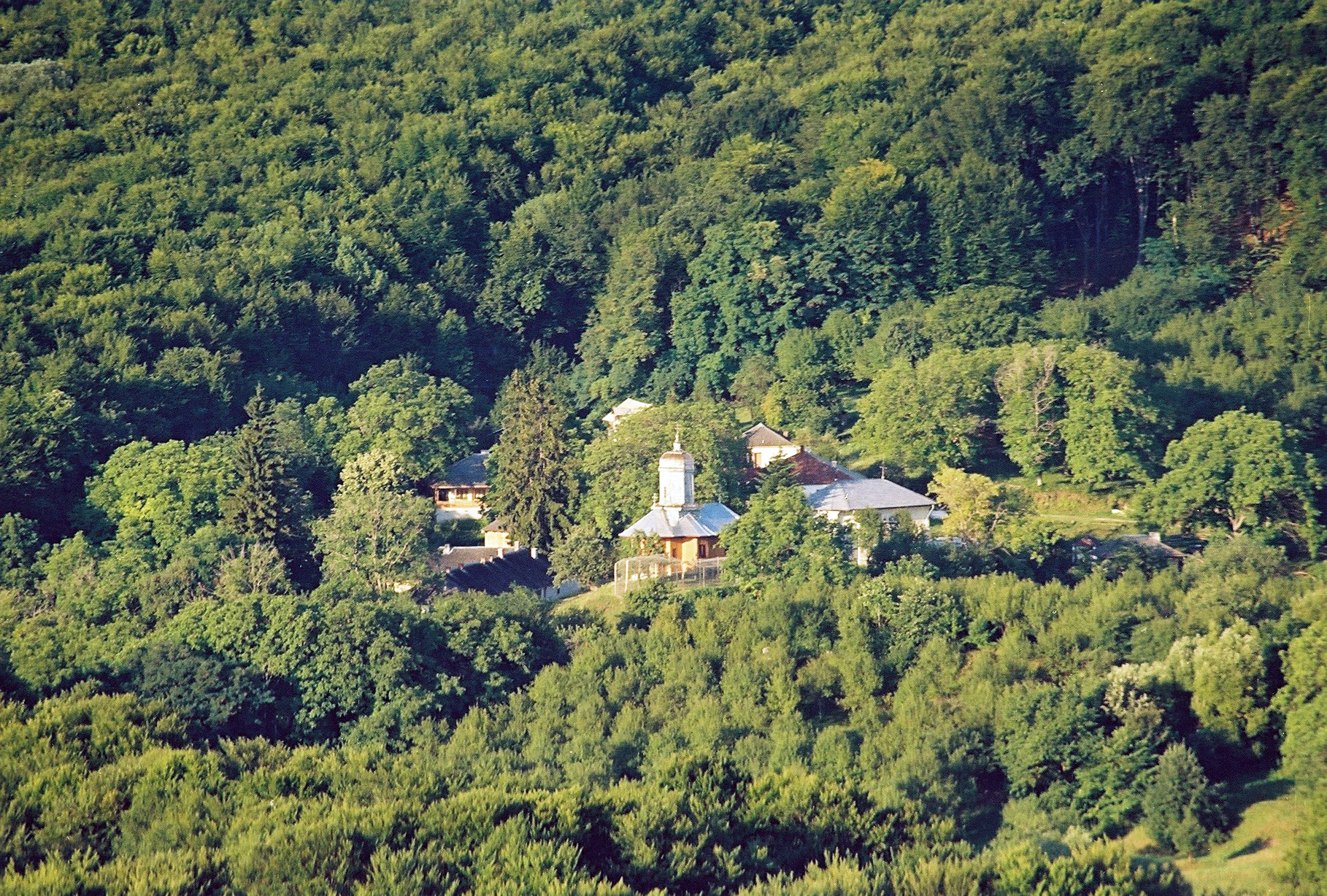 Schitul Dălhăuţi - vedere de ansamblu dinspre răsărit